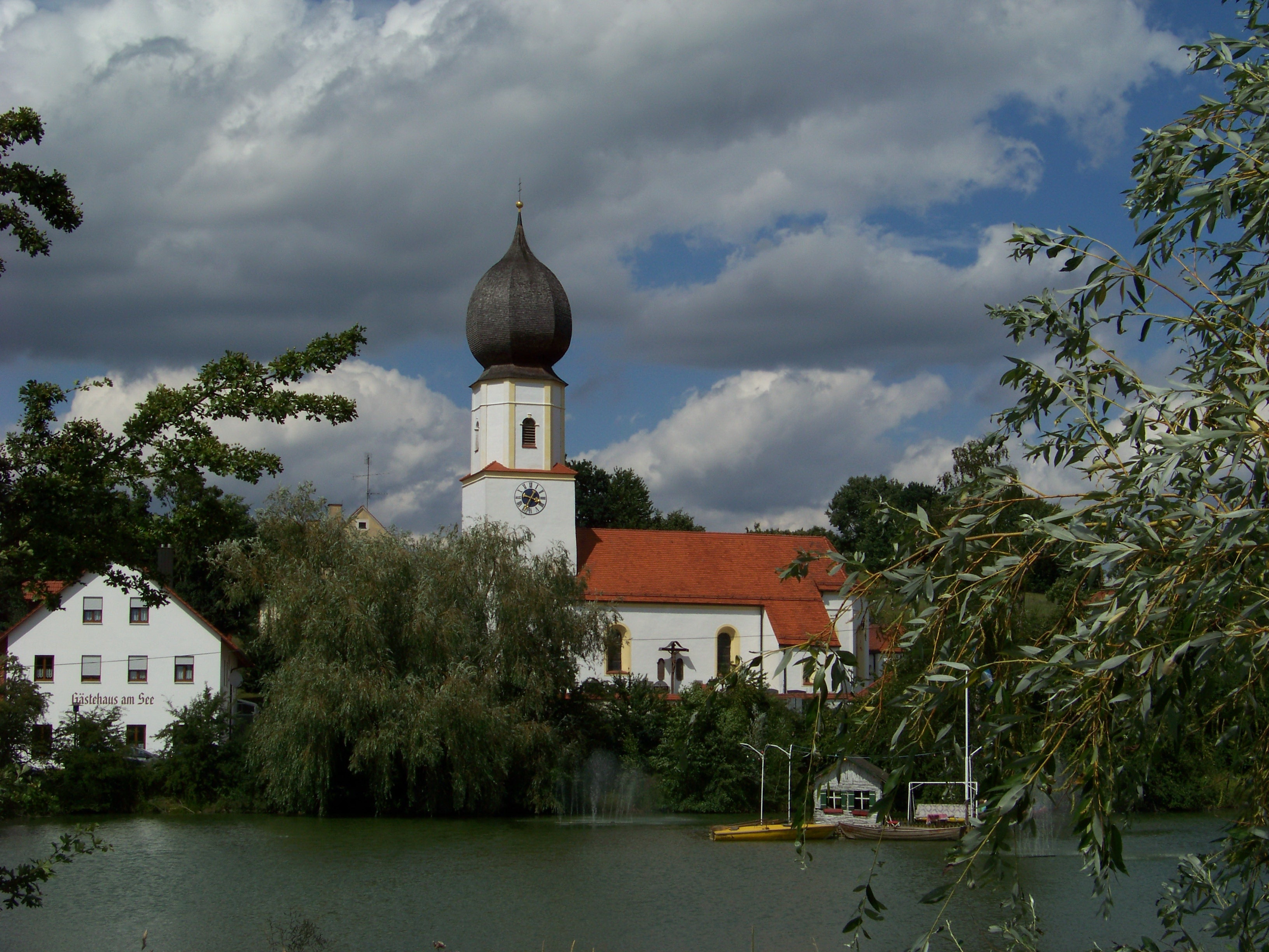 Herrngiersdorf, Semerskirchen, Am See 1. Katholische Pfarrkirche Mariä Himmelfahrt, Saalkirche mit Satteldach und eingezogenem, fünfseitig geschlossenem Chor, Westturm mit mächtiger Zwiebelhaube, Langhausmauern und Turmunterbau im Kern mittelalterlich, Chor spätgotisch, Ausbau der Kirche im 17./18. Jahrhundert; mit Ausstattung; Kirchhofmauer, 18./19. Jahrhundert.